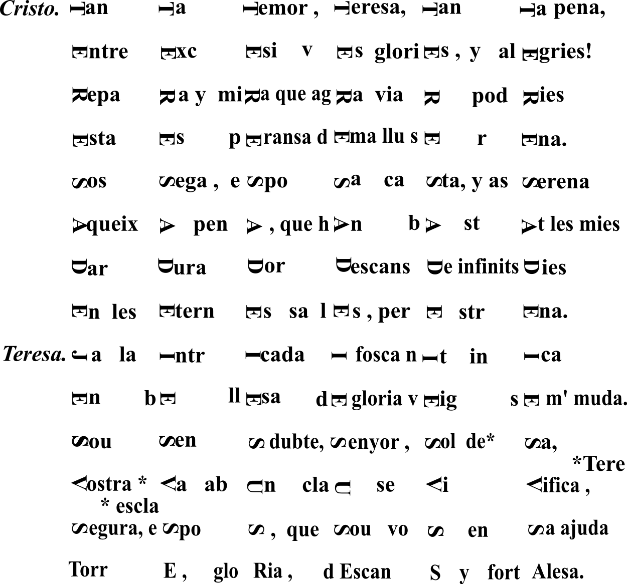 Poesías jocosas y serias del célebre Dr. Vincens García, Rector de Vallfogona. Nova edició aumentada, corretgida, y arreglada a la ortografía moderna., Barcelona, Imprenta Nacional de Josep Torner. 1820. Pag 131 vectoritzada i convertida a png